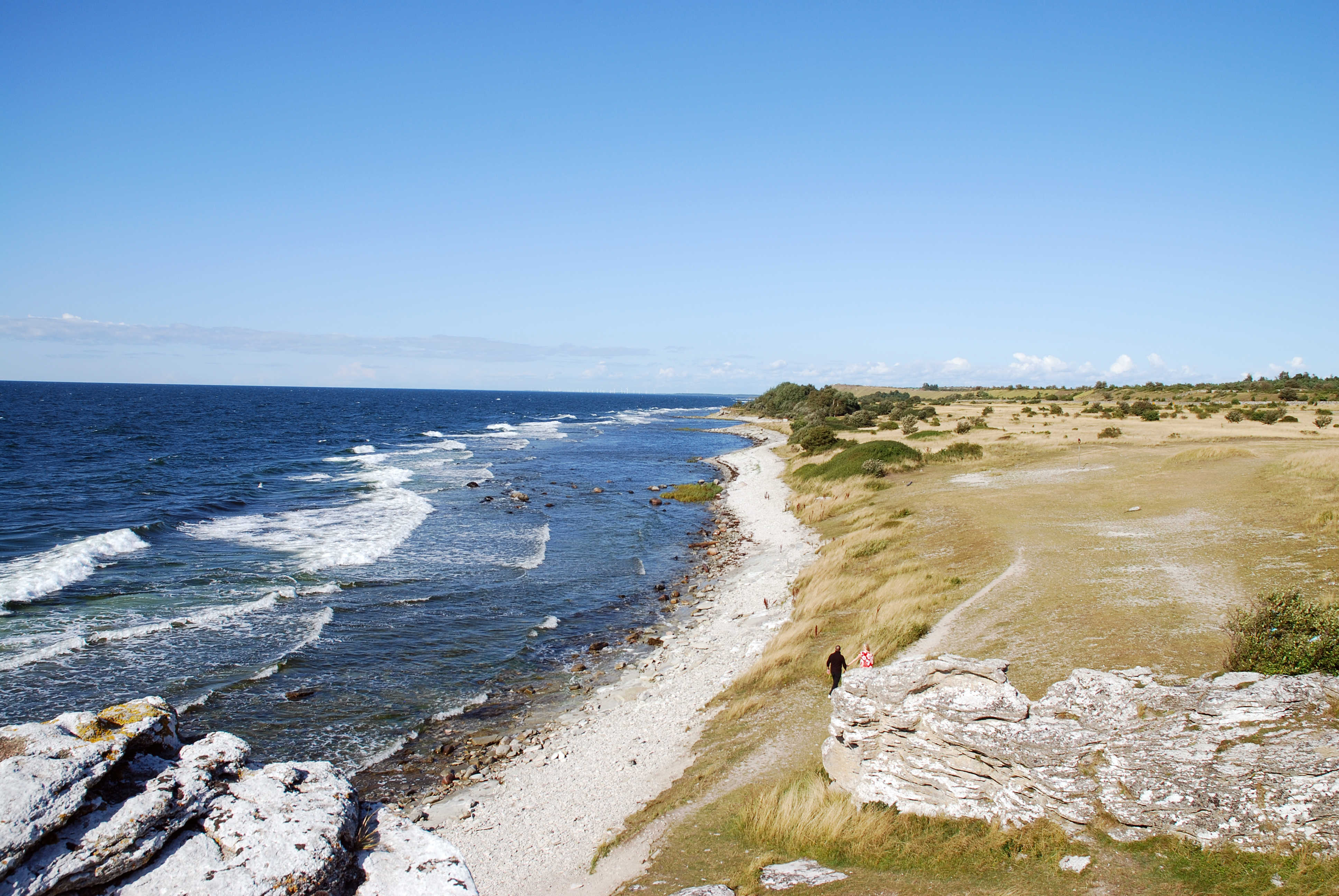 Hoburg,Gotland,Aug 2009